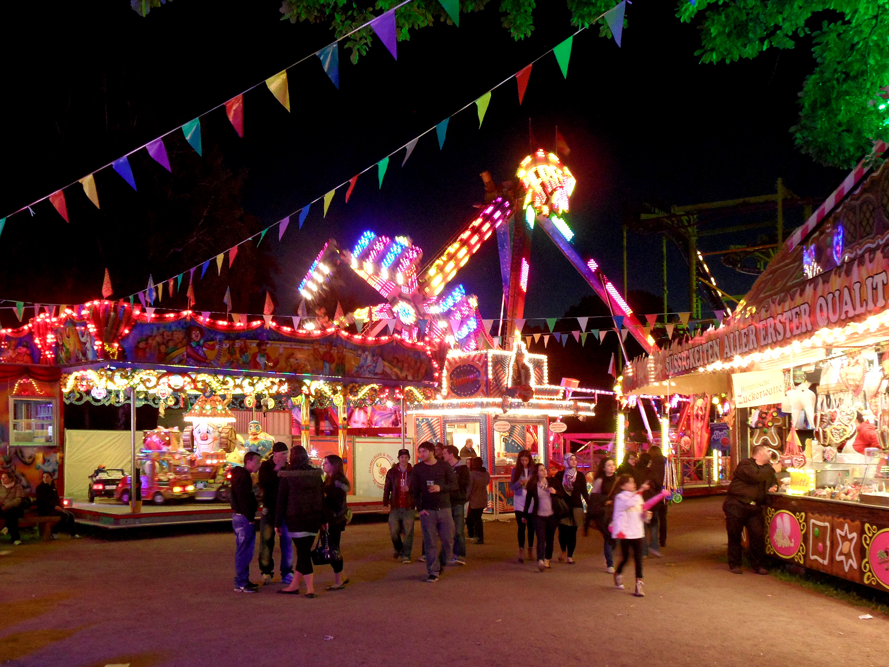 Neuköllner Maientage im Jahr 2012, Berlin-Hasenheide